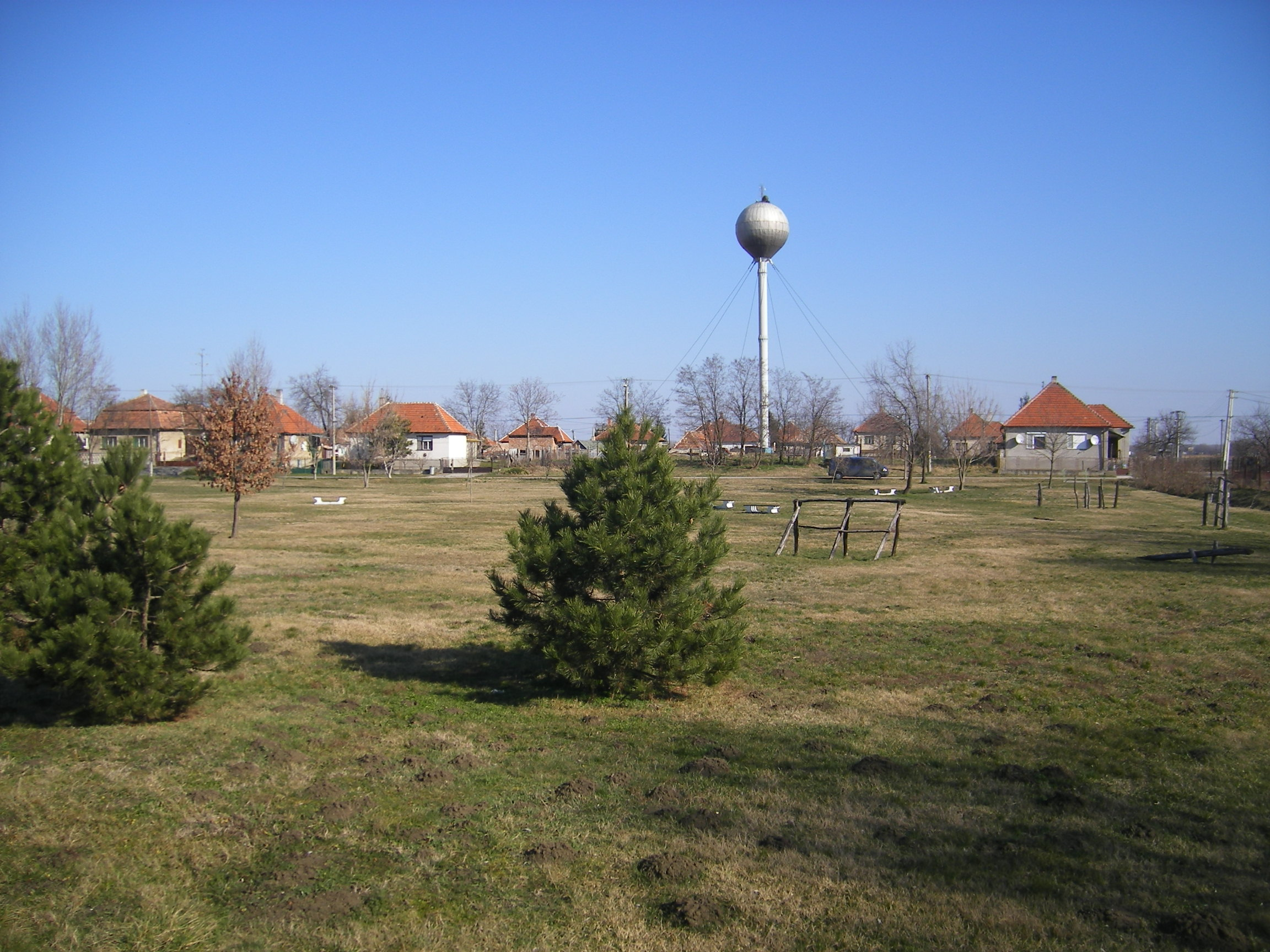 Megyercs (Komáromi járás)